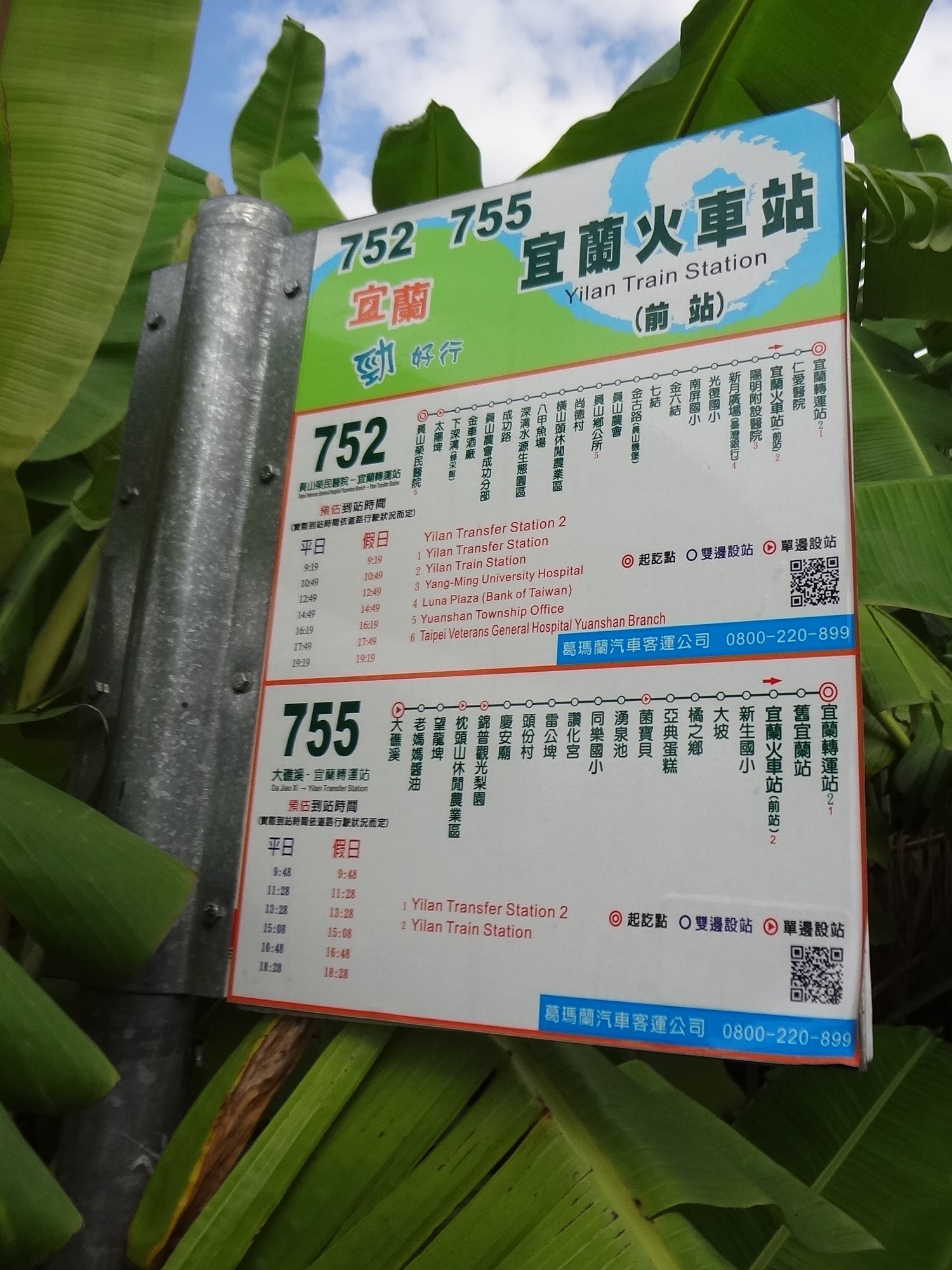 中文（台灣）: 臺灣鐵路管理局宜蘭車站前站對面，葛瑪蘭客運宜蘭勁好行752及755線「宜蘭火車站前站」站牌。